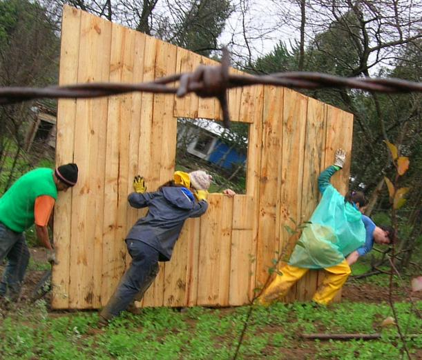 Gente armando una mediagua